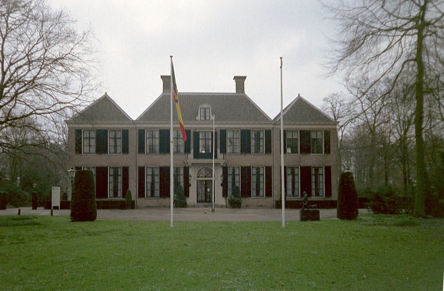 Hoofdgebouw ("Boom en Bosch") van het gemeentehuis van Breukelen, Utrecht, Markt 13. Foto genomen op en geupload door maker.